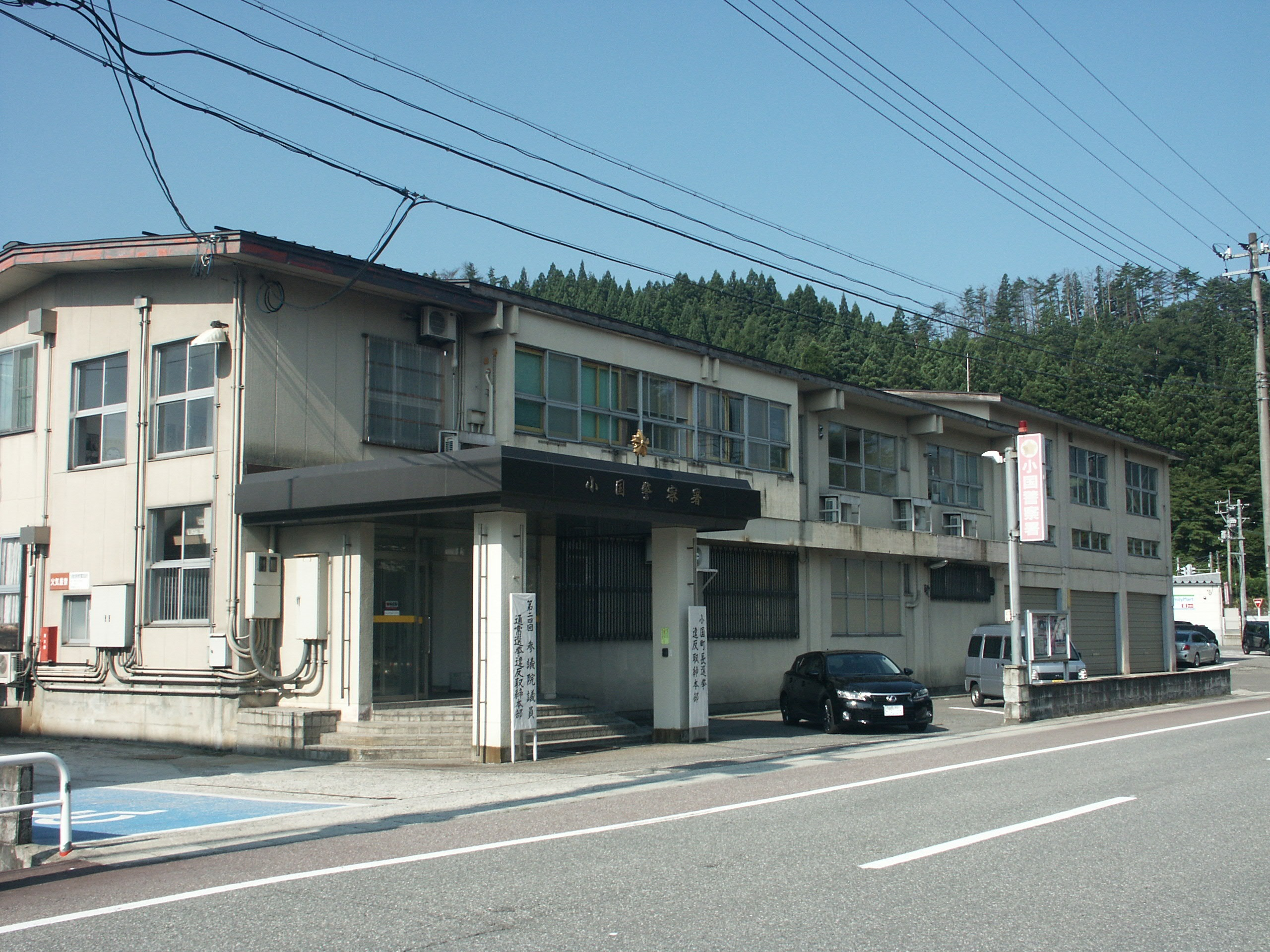 山形県小国警察署庁舎